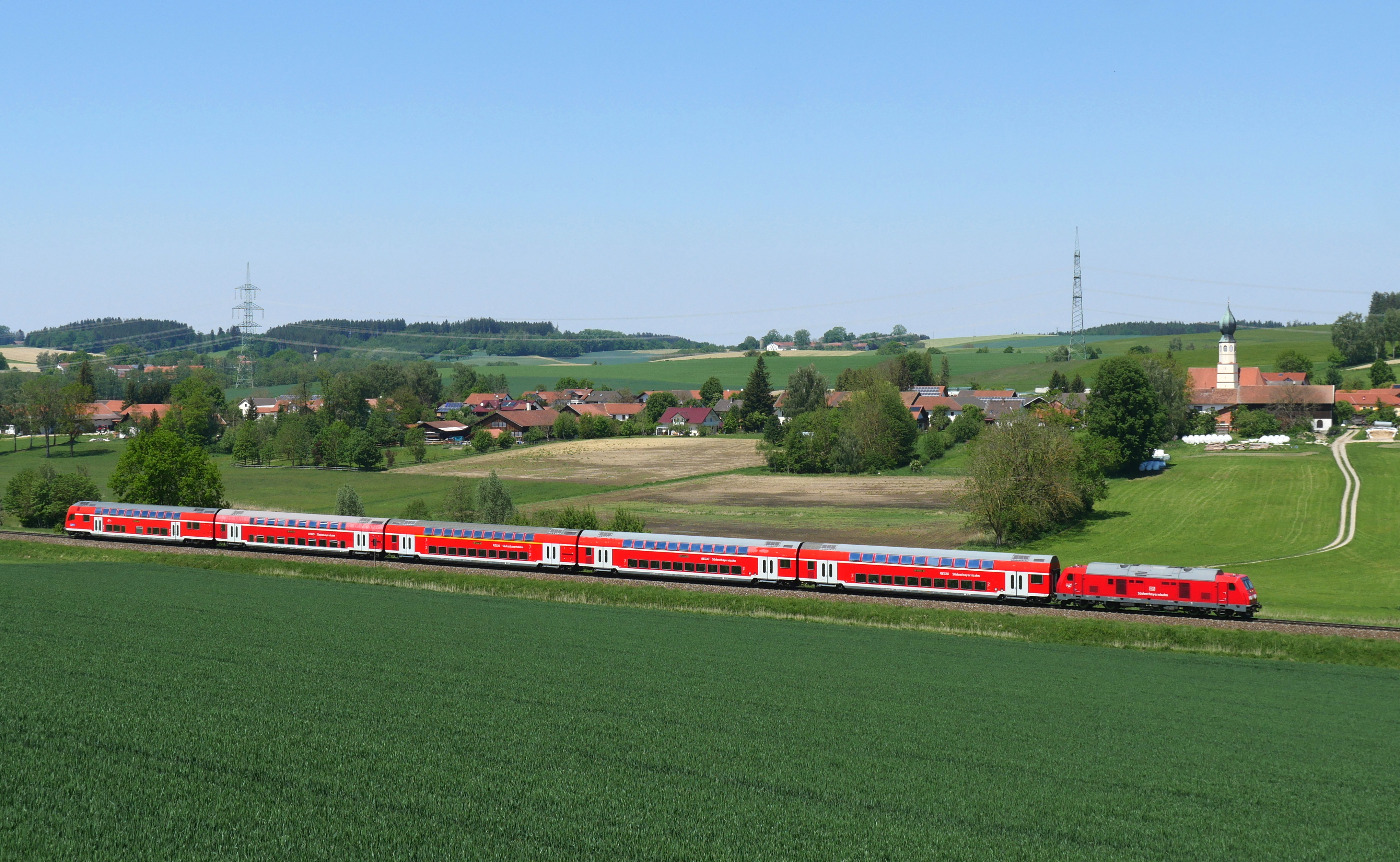 Diesellokomotive der Baureihe 245 der Südostbayernbahn mit der aus fünf Doppelstockwagen gebildeten RB 27040 auf der Bahnstrecke München–Simbach zwischen Thann-Matzbach und Dorfen Bahnhof. Im Hintergrund das Dorf Niedergeislbach mit der Kirche St. Stephanus. Ansicht von Holnburg (aus Richtung Süden).